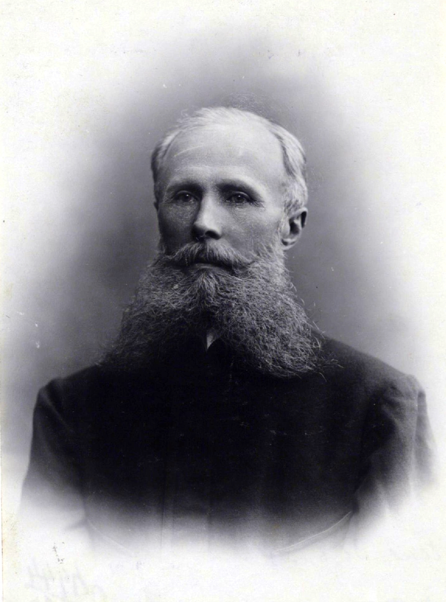 Владимир Петрович Наливкин, русский офицер, член II Государственной думы от города Ташкента.